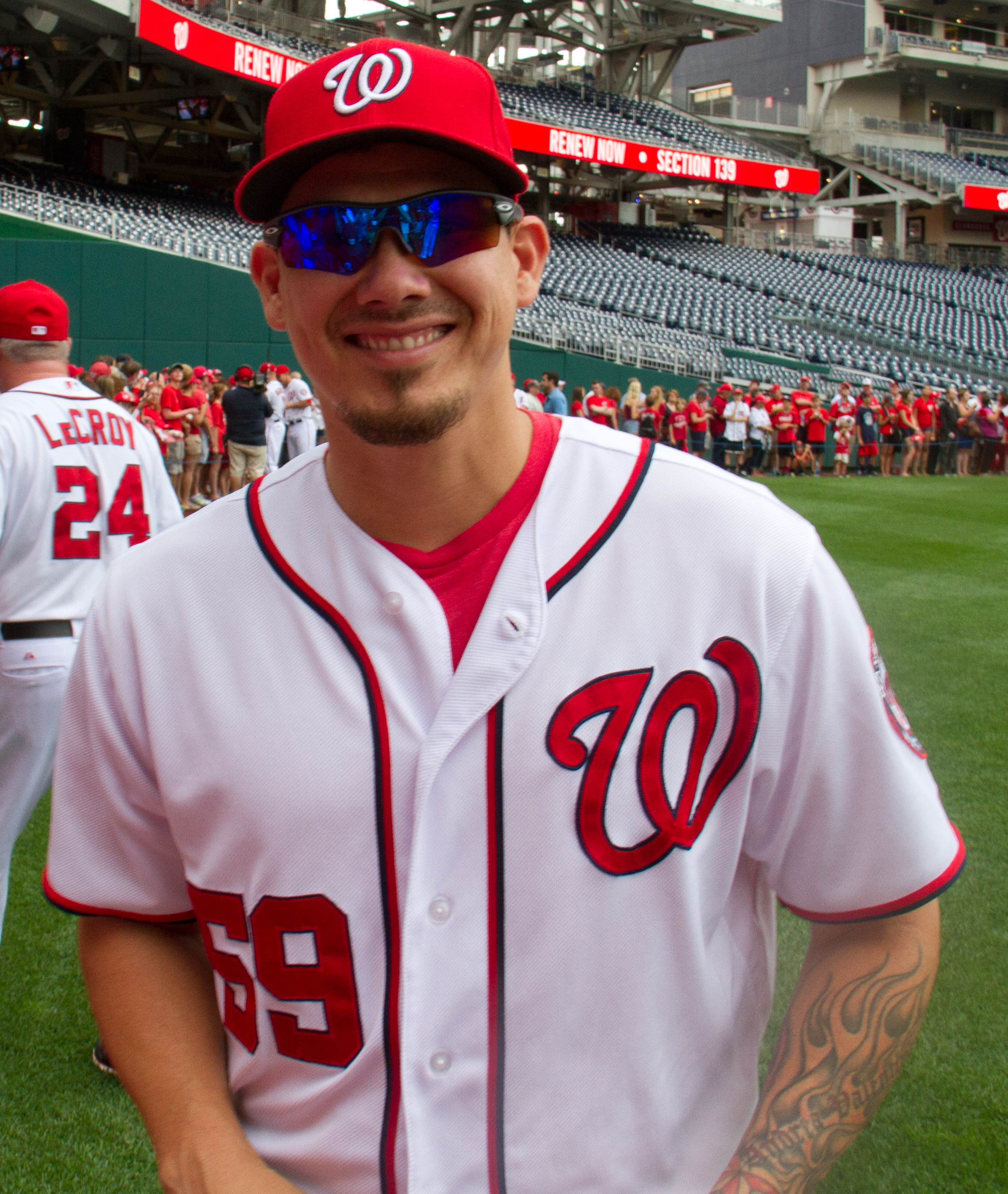 José Lobatón